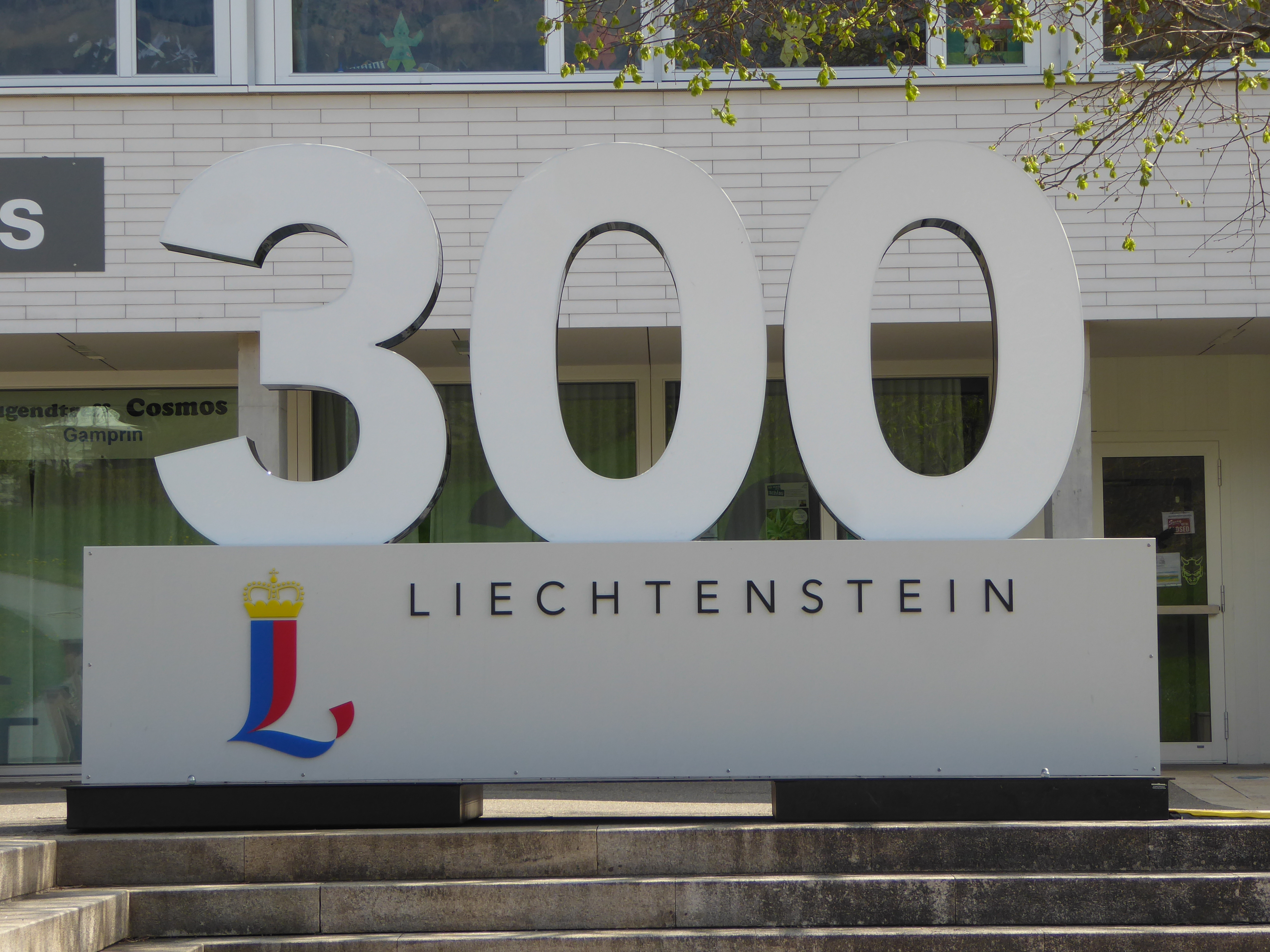 Jubiläumsschriftzug 300 Jahre Fürstentum Liechtenstein in Gamprin